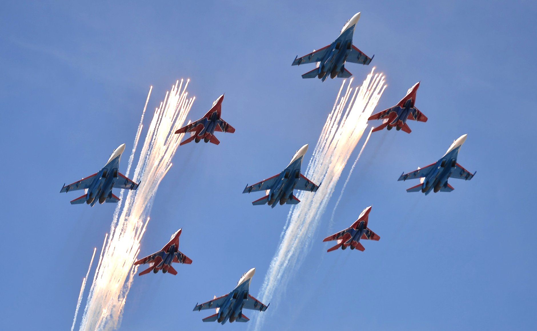 Многоцелевые истребители Су-27 пилотажной группы Русские Витязи и МиГ-29 пилотажной группы Стрижи во время военного парада в ознаменование 70-летия Победы в Великой Отечественной войне 1941–1945 годов.